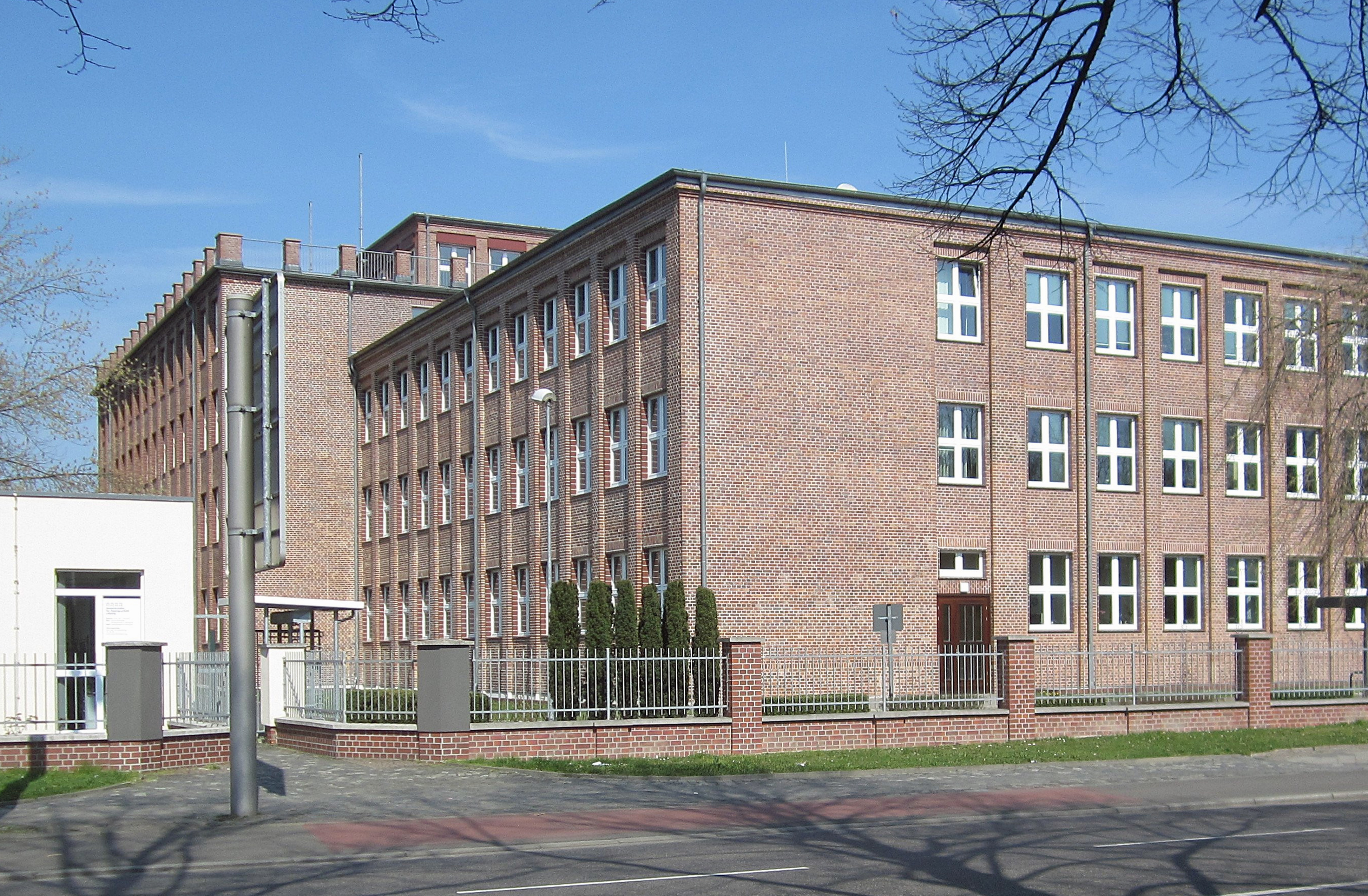 Wissenschaftspark Leipzig an der Permoserstraße